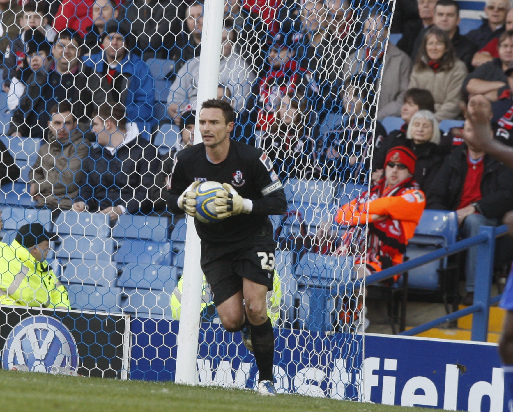 Darryl flahavan